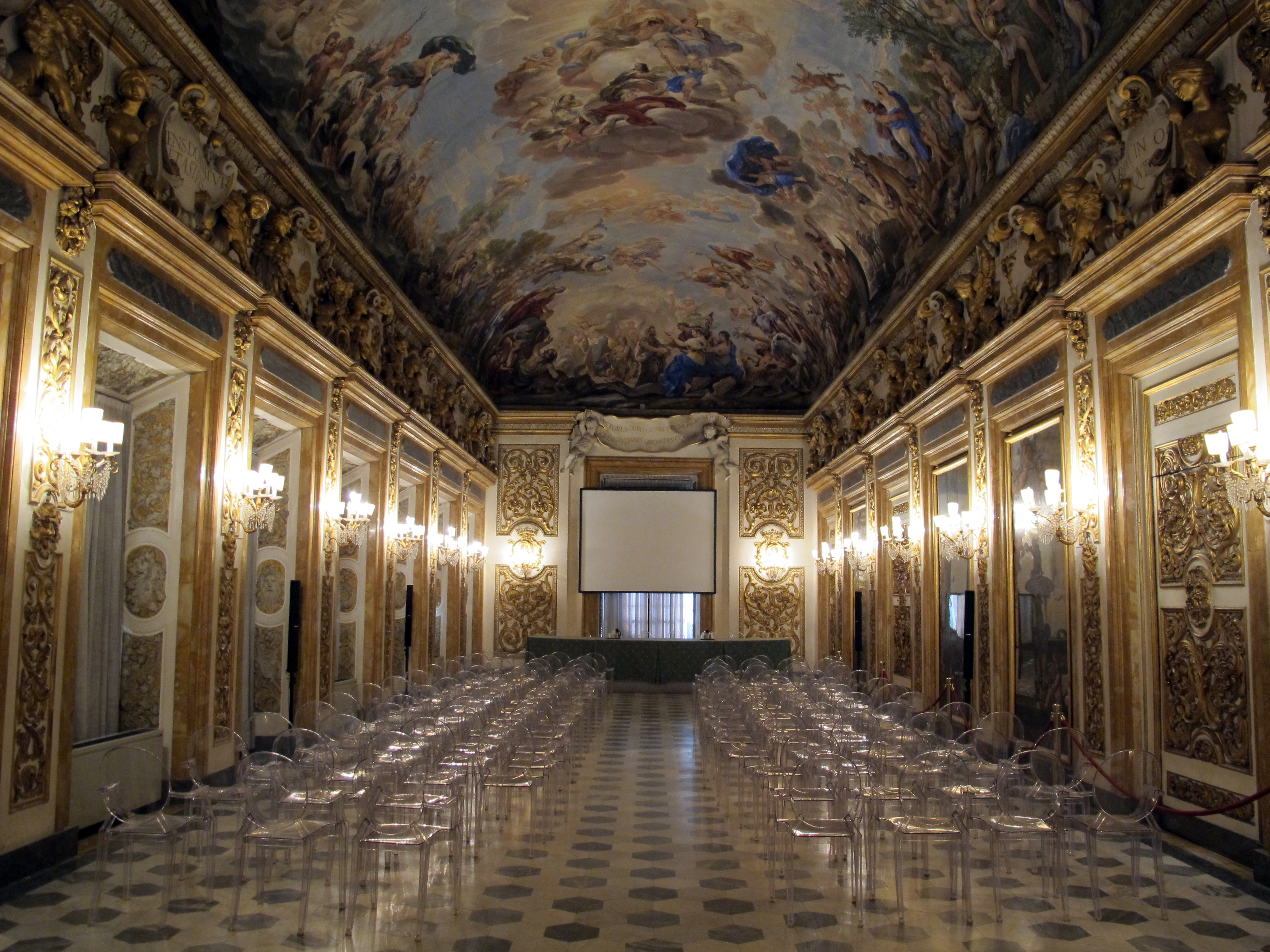 Palazzo Medici Riccardi (Florence) - Galleria